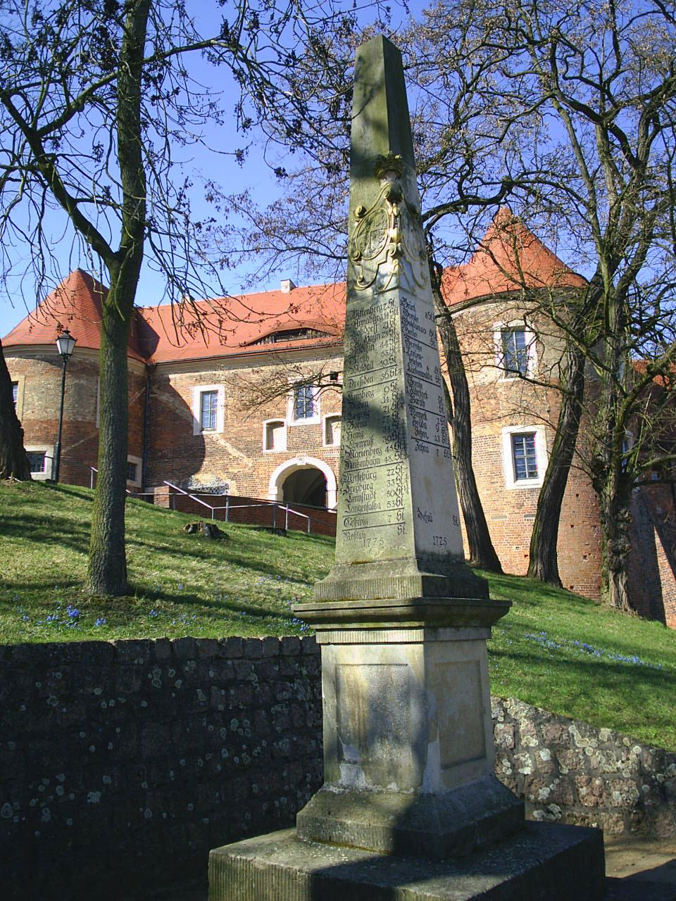 Postmeilensäule Belzig; Süd- und Ostseite